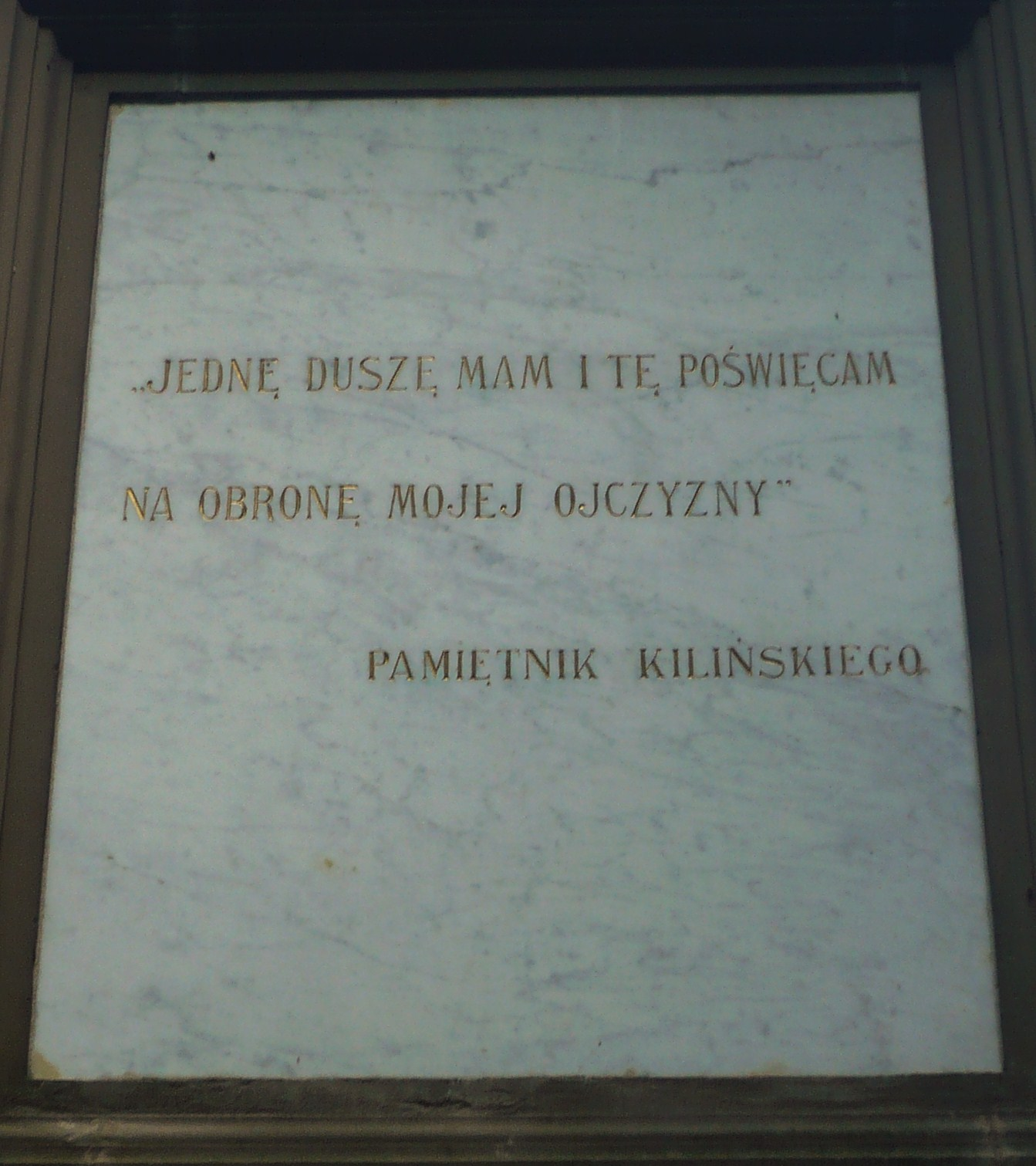 Lwów. Pomnik Kilińskiego